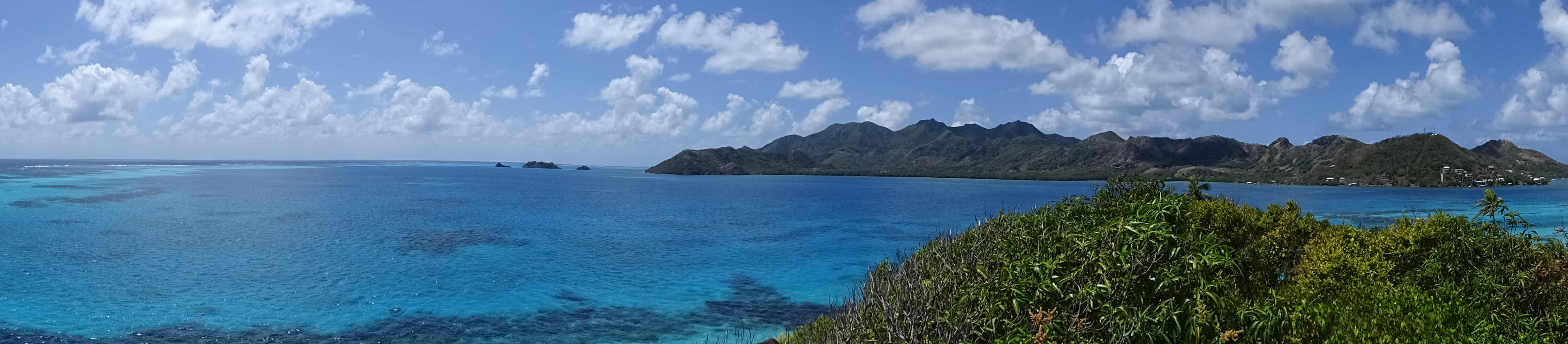 Imagen panorámica del parque nacional natural Old Providence McBean Lagoon tomada desde Cayo Cangrejo